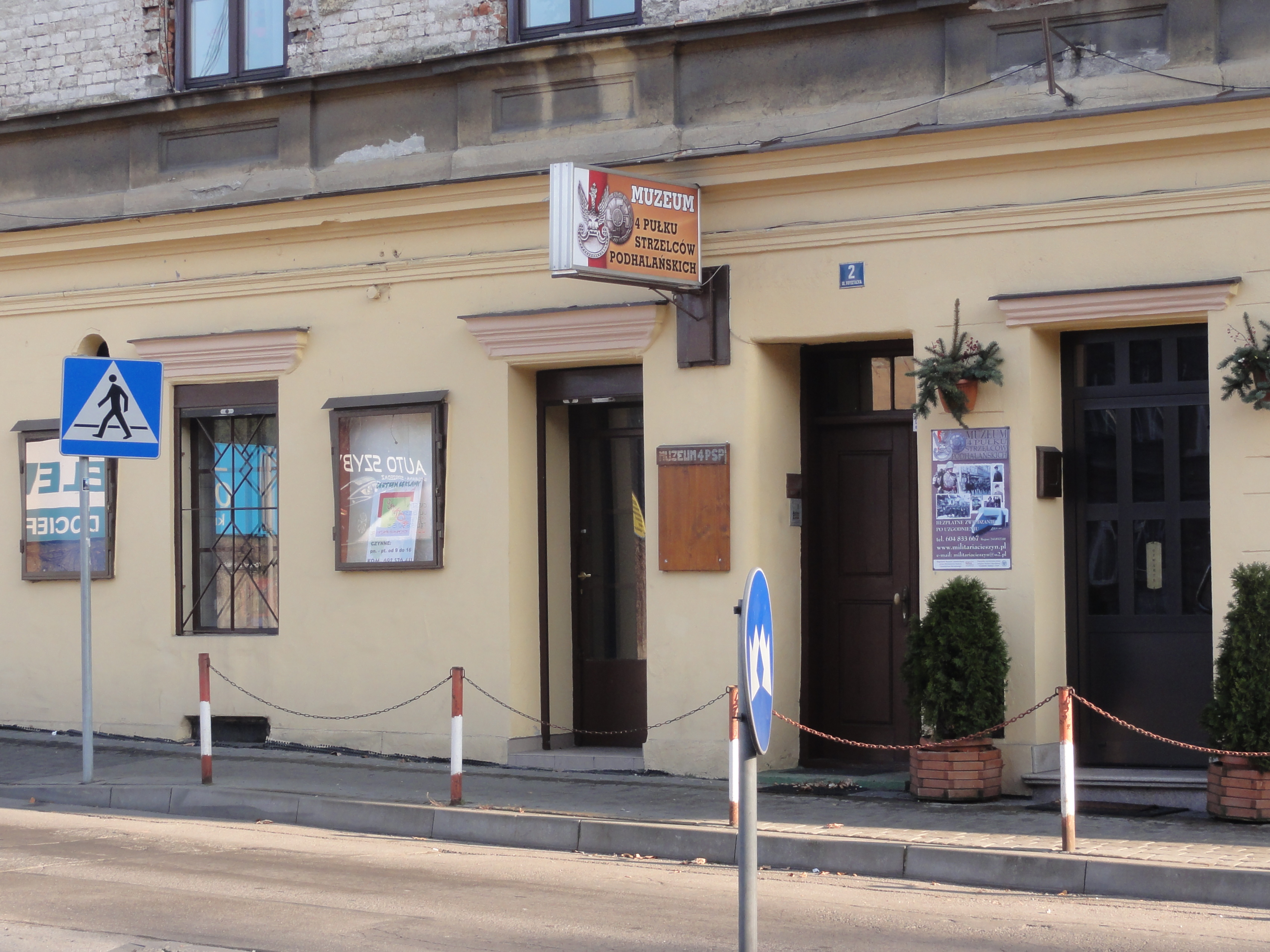 Muzeum 4 Pułku Strzelców Podhalańskich przy ulicy Frysztackiej w Cieszynie.